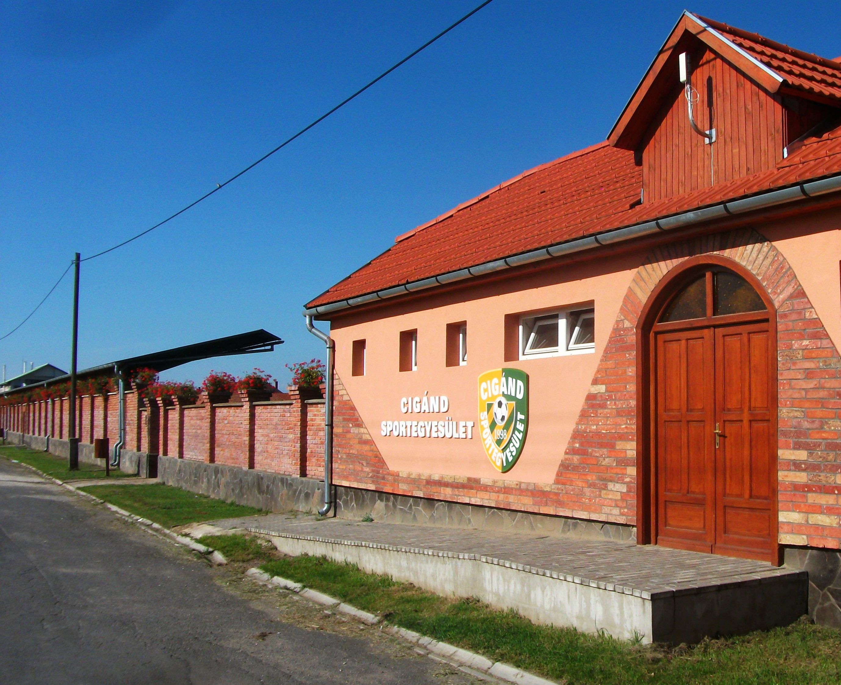 A Cigánd Sportegyesület labdarúgópályájának főbejárata, Cigánd Fő utcája felől.